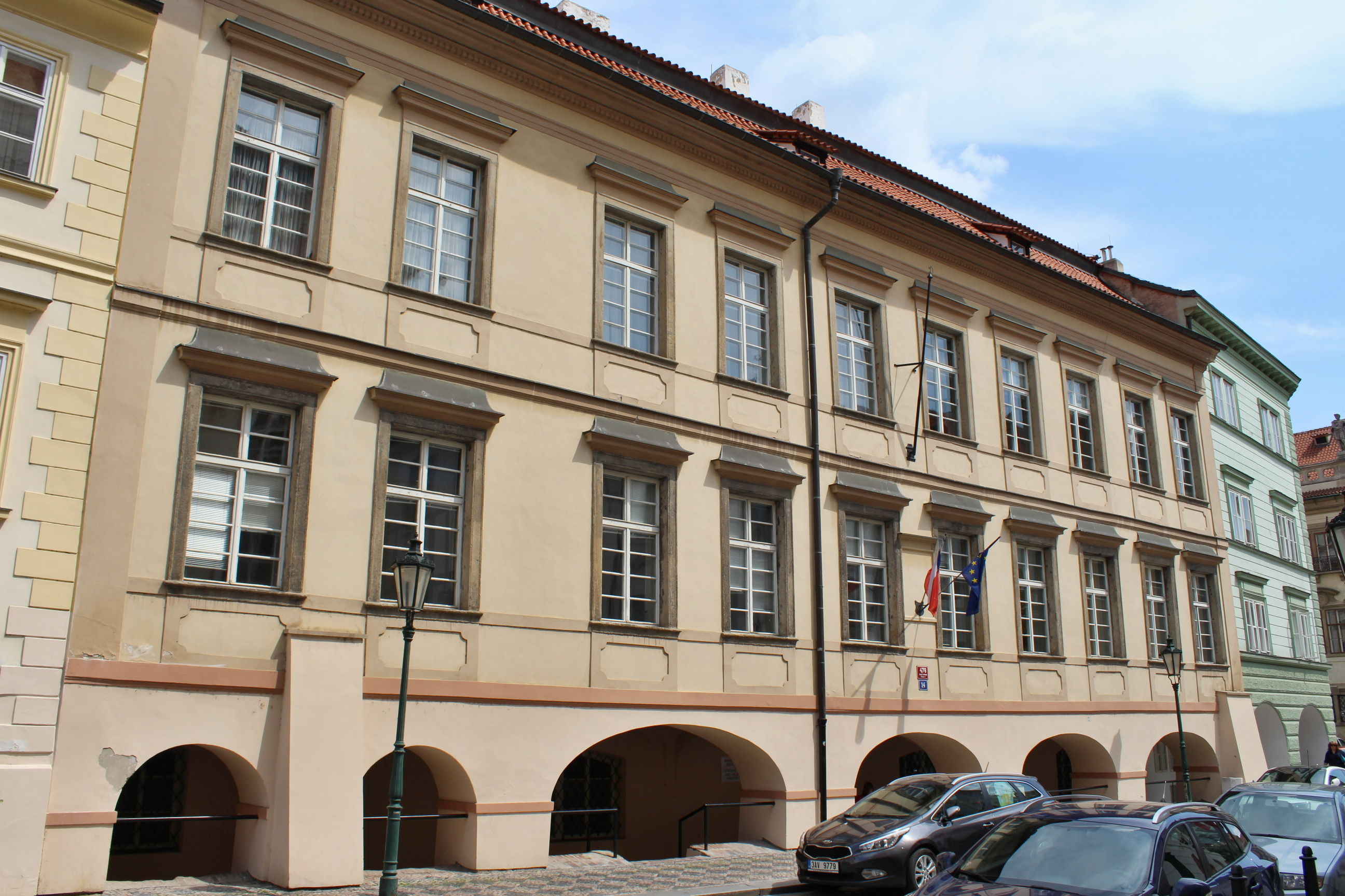 Malá Strana palác Straků z Nedabylic